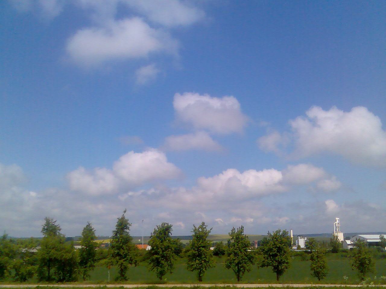 Blick über Sonneborn, Deutschland